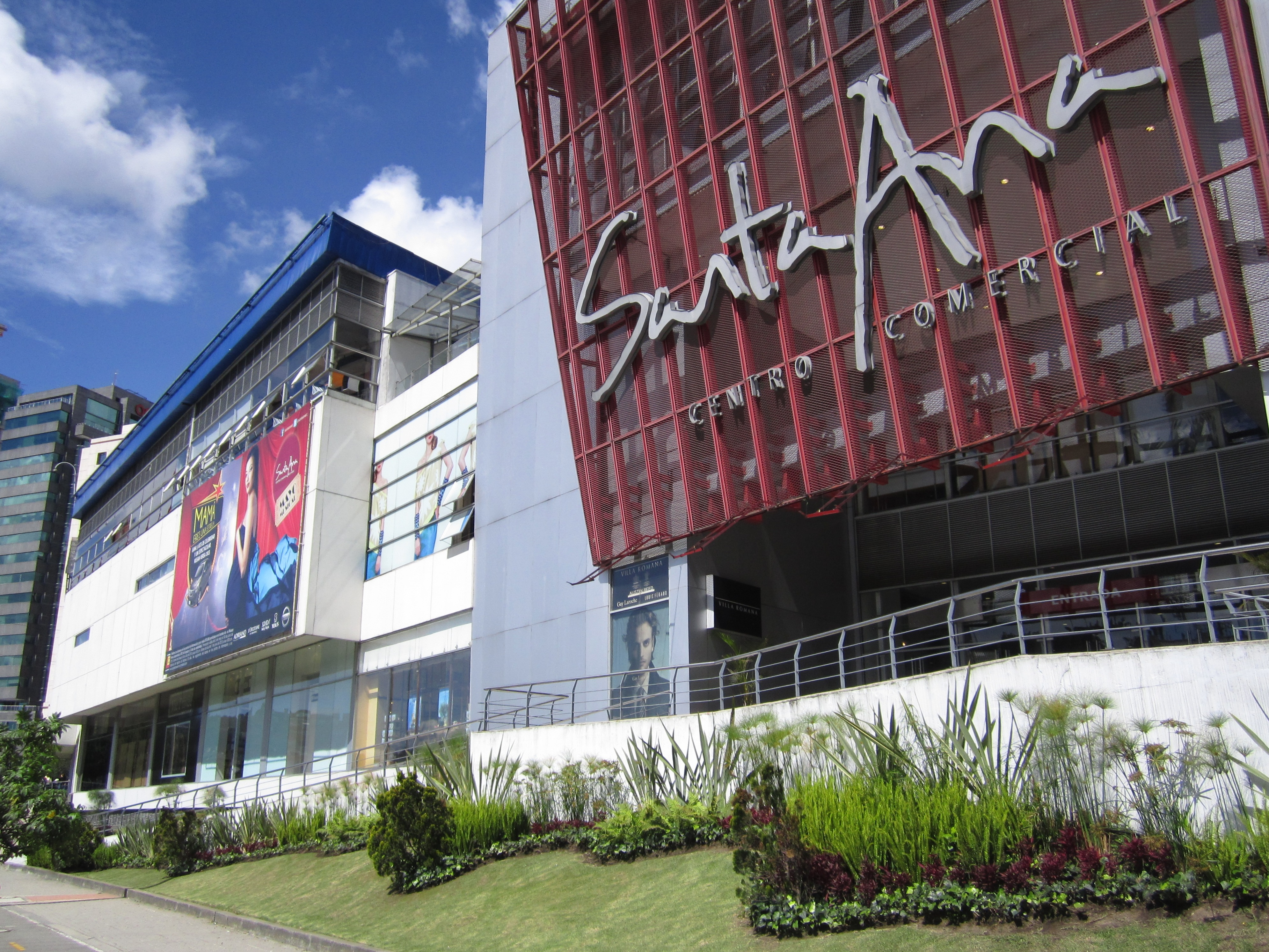 Bogotá- centro comercial Santa Ana, localidad de Usaquén, barrio Santa Ana Occidental, calle 110 entre la carrera 8 y la avenida NQS.